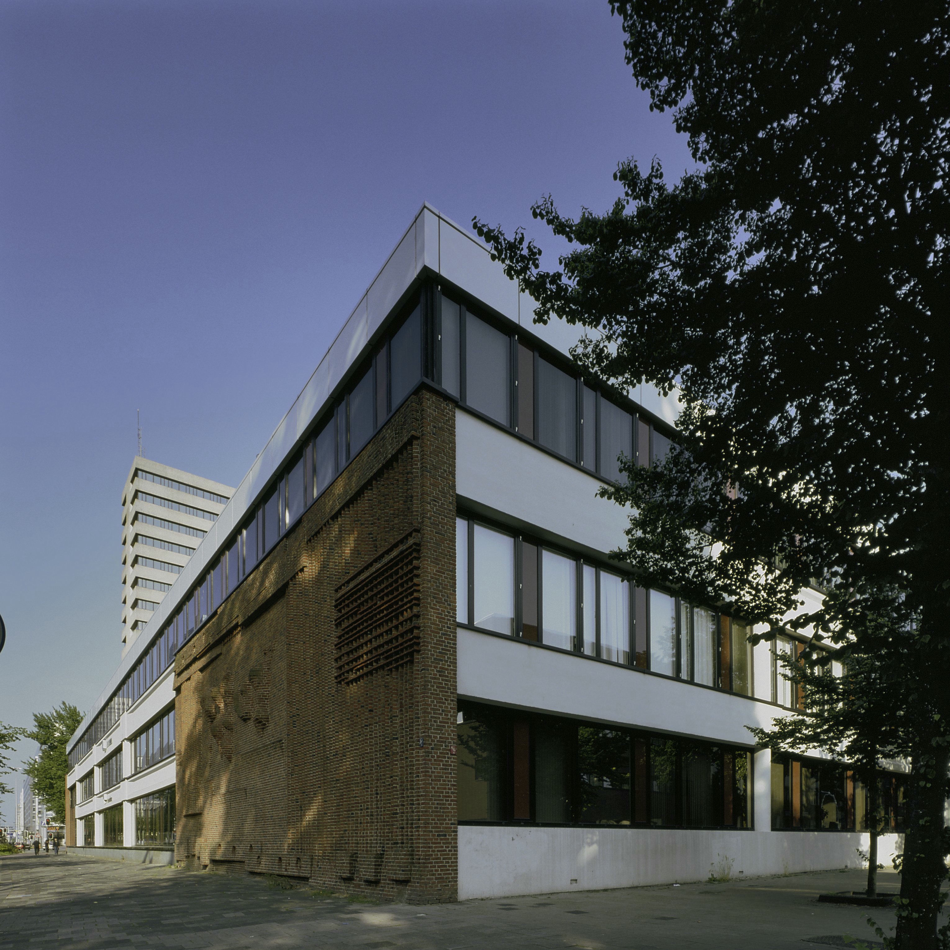 Bouwcentrum: Overzicht met de gevel met het baksteenreliëf van Henry Moore, gebouw aan het Weena (opmerking: Gefotografeerd voor Monumenten van Herrezen Nederland)